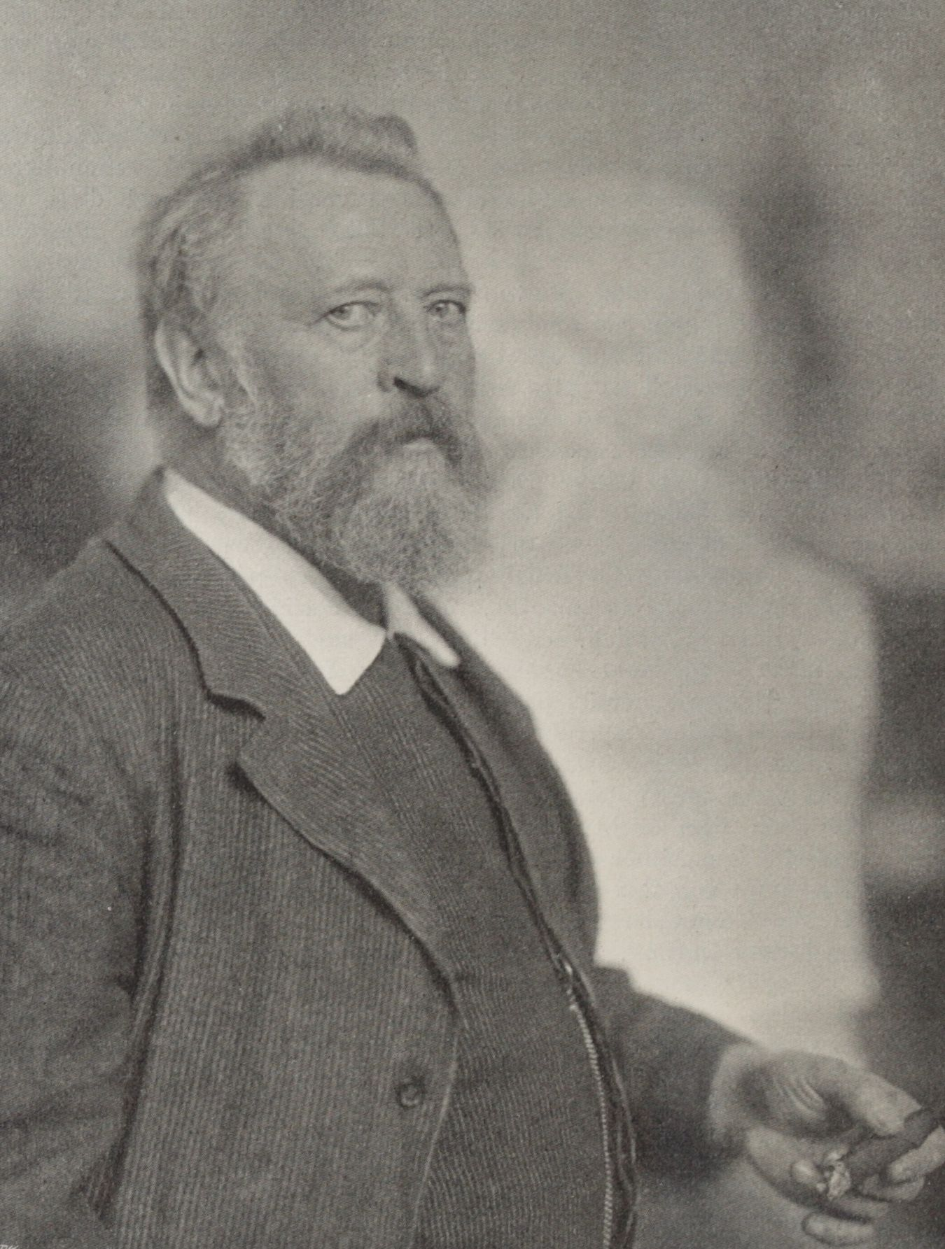 Porträt des Bildhauers Adolf von Hildebrand